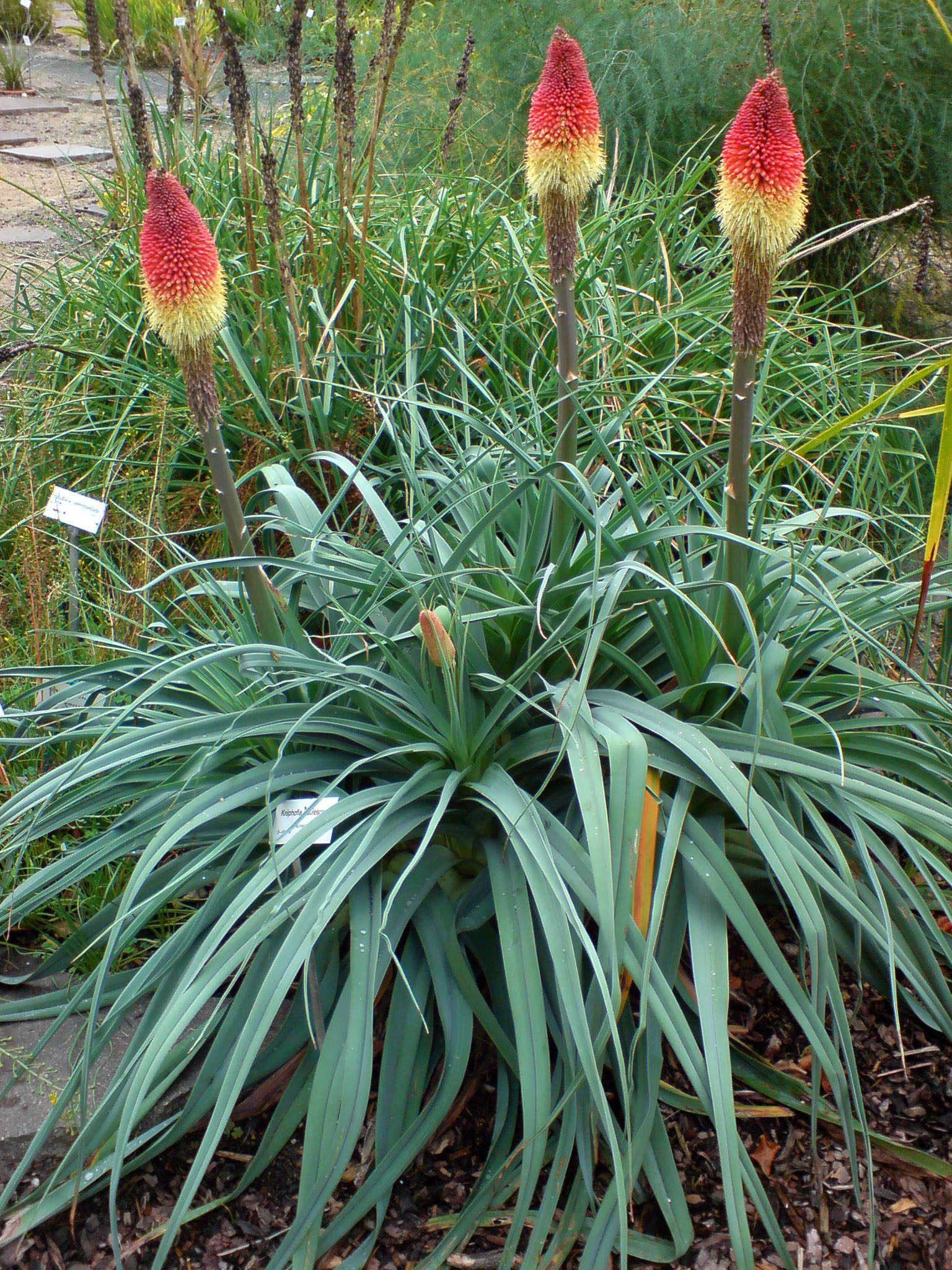 Kniphofia caulescens (Fackellilie) - Botanischer Garten Leipzig